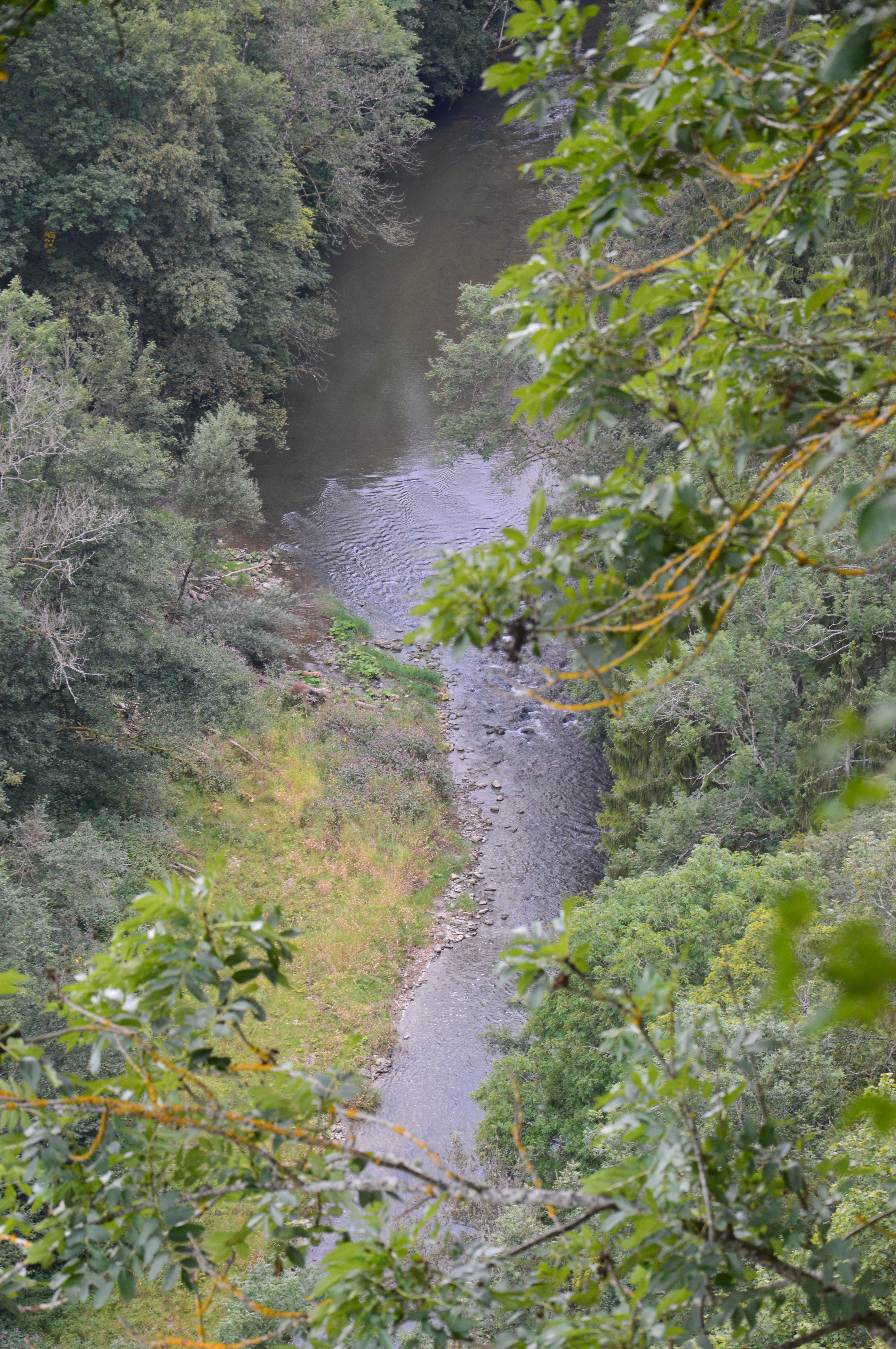 Uusbligg vo dè Flüèkanzel uff d Wuètè. D Kanzel lyt nooch bim obberè Iischtyg i d Flüè am Obberè Flüèwäg, guèt erreichbar vom Wanderparkblatz am Wellblèchwäg.